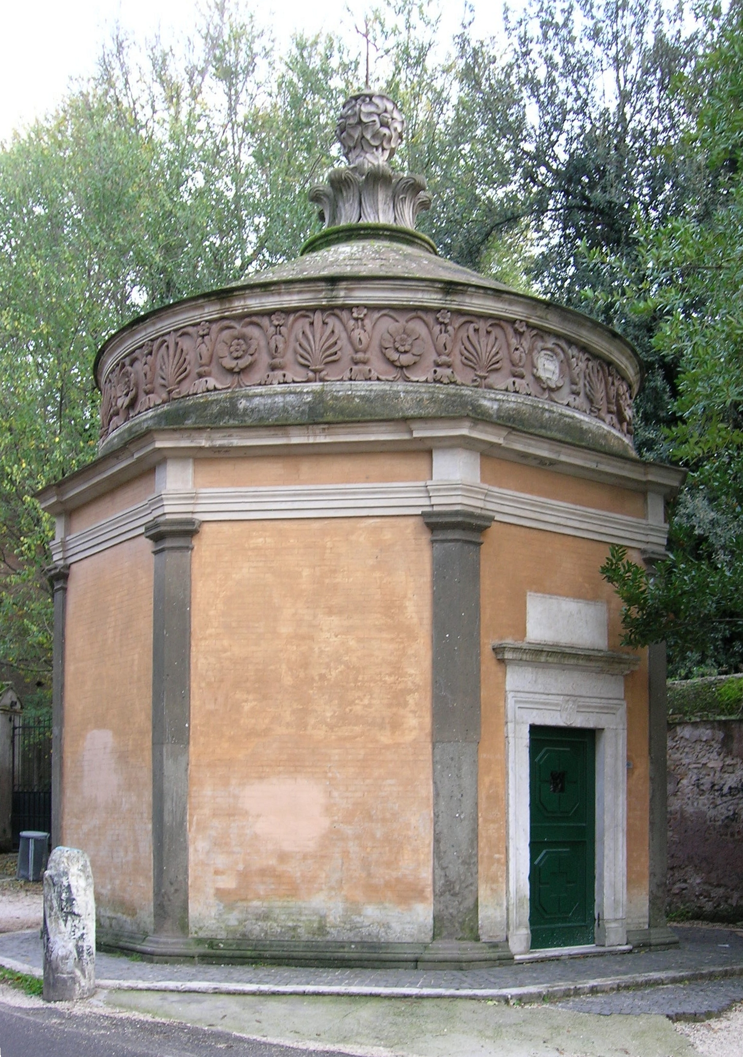 Oratoire de San Giovanni in Oleo sur la via Latina a Rome